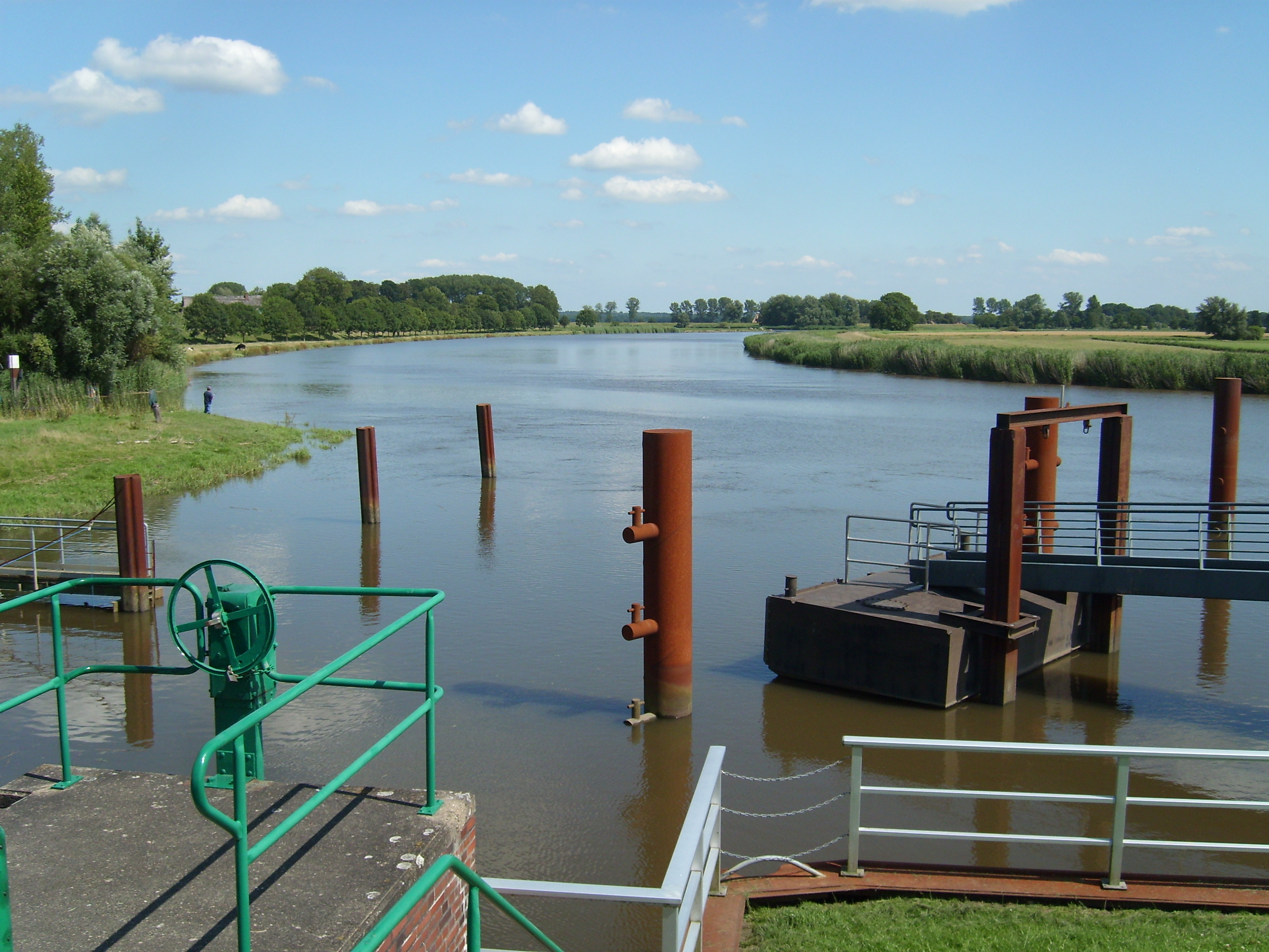 Die Stör bei der Schleuse Kasenort, die Stör und Wilsterau miteinander verbindet